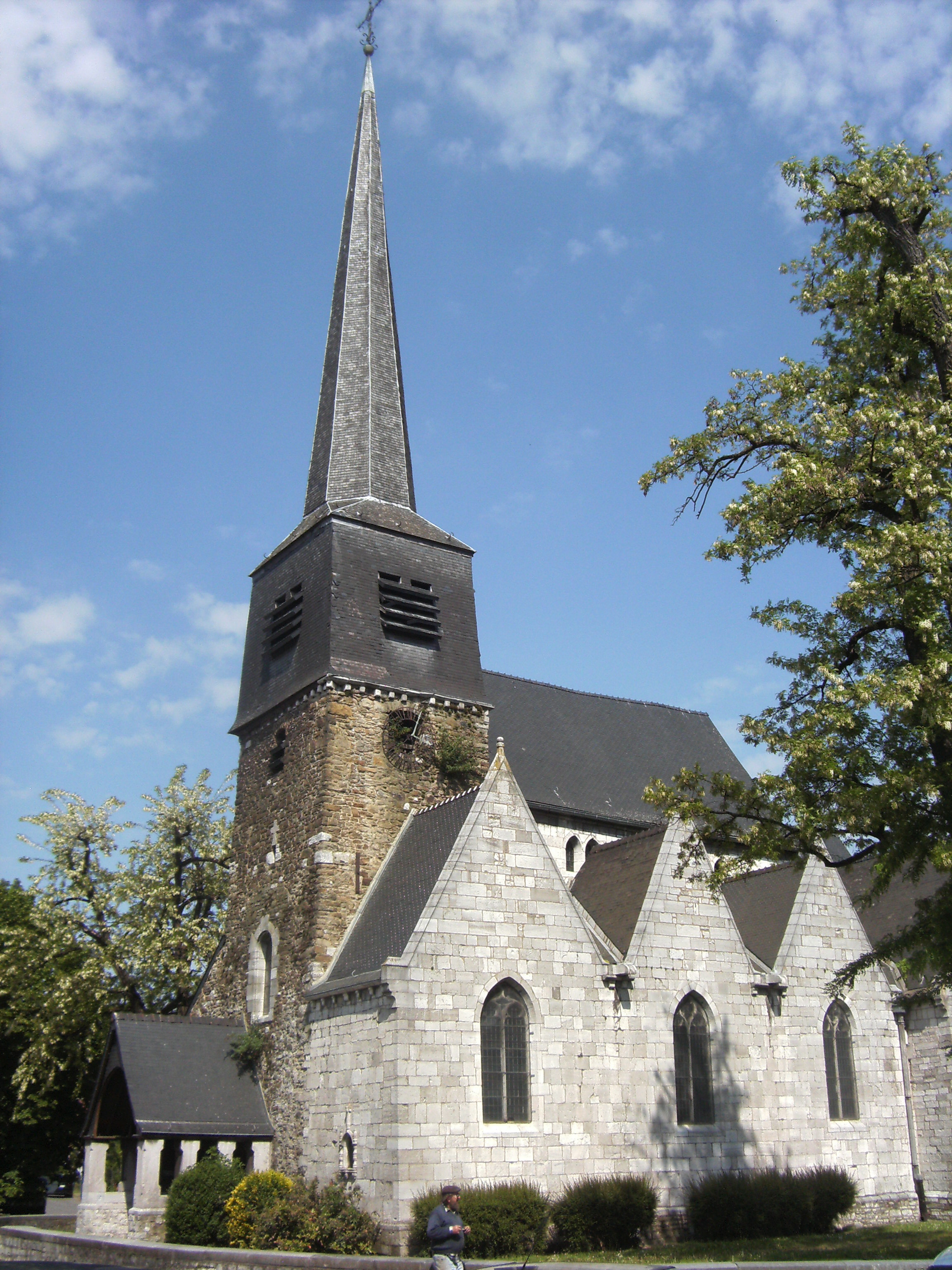 Couillet (Charleroi-Belgique) - Église Saint-Laurent.